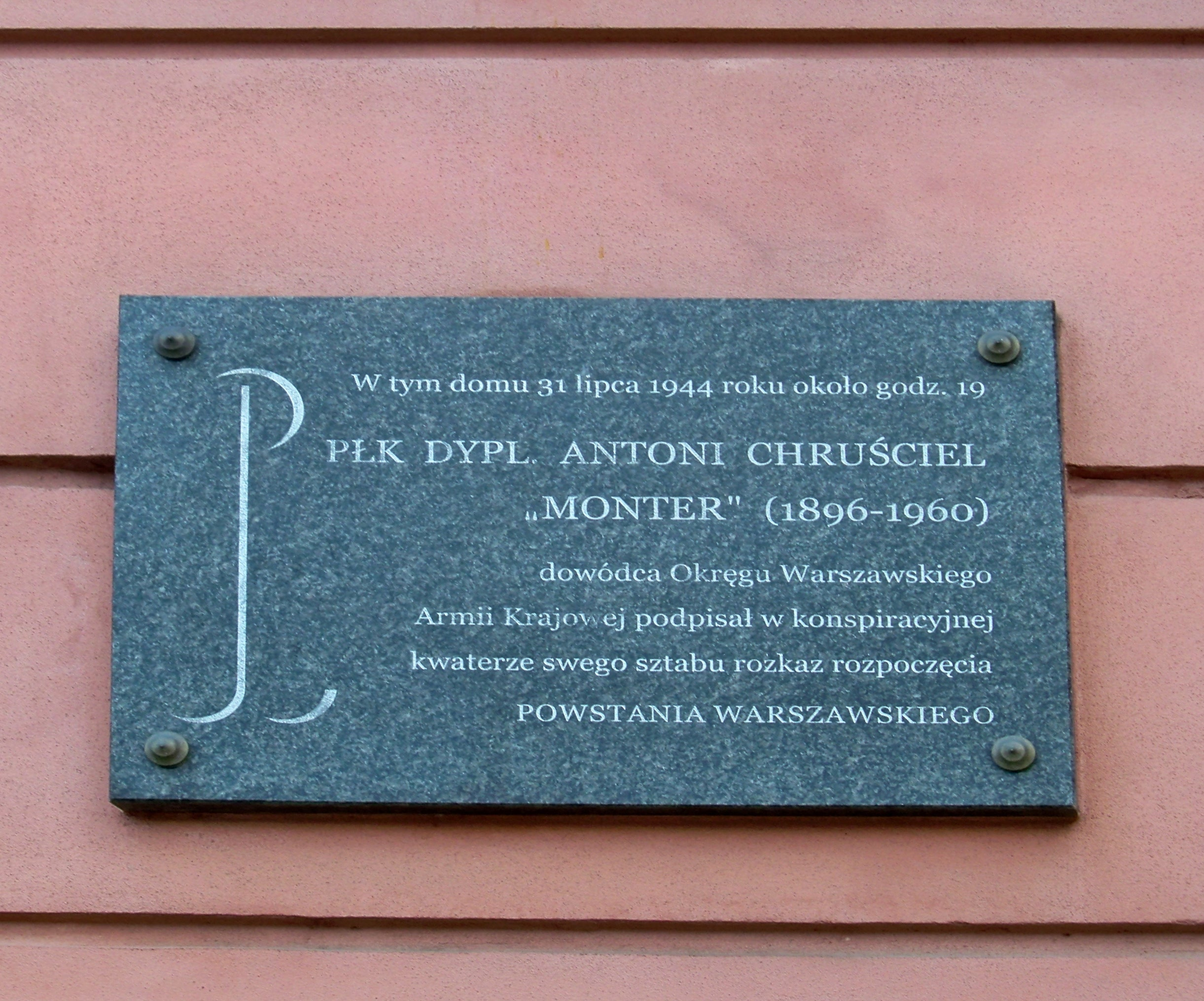 Tablica upamiętniająca podpisanie rozkazu wybuchu powstania warszawskiego, ul. Filtrowa 68 w Warszawie